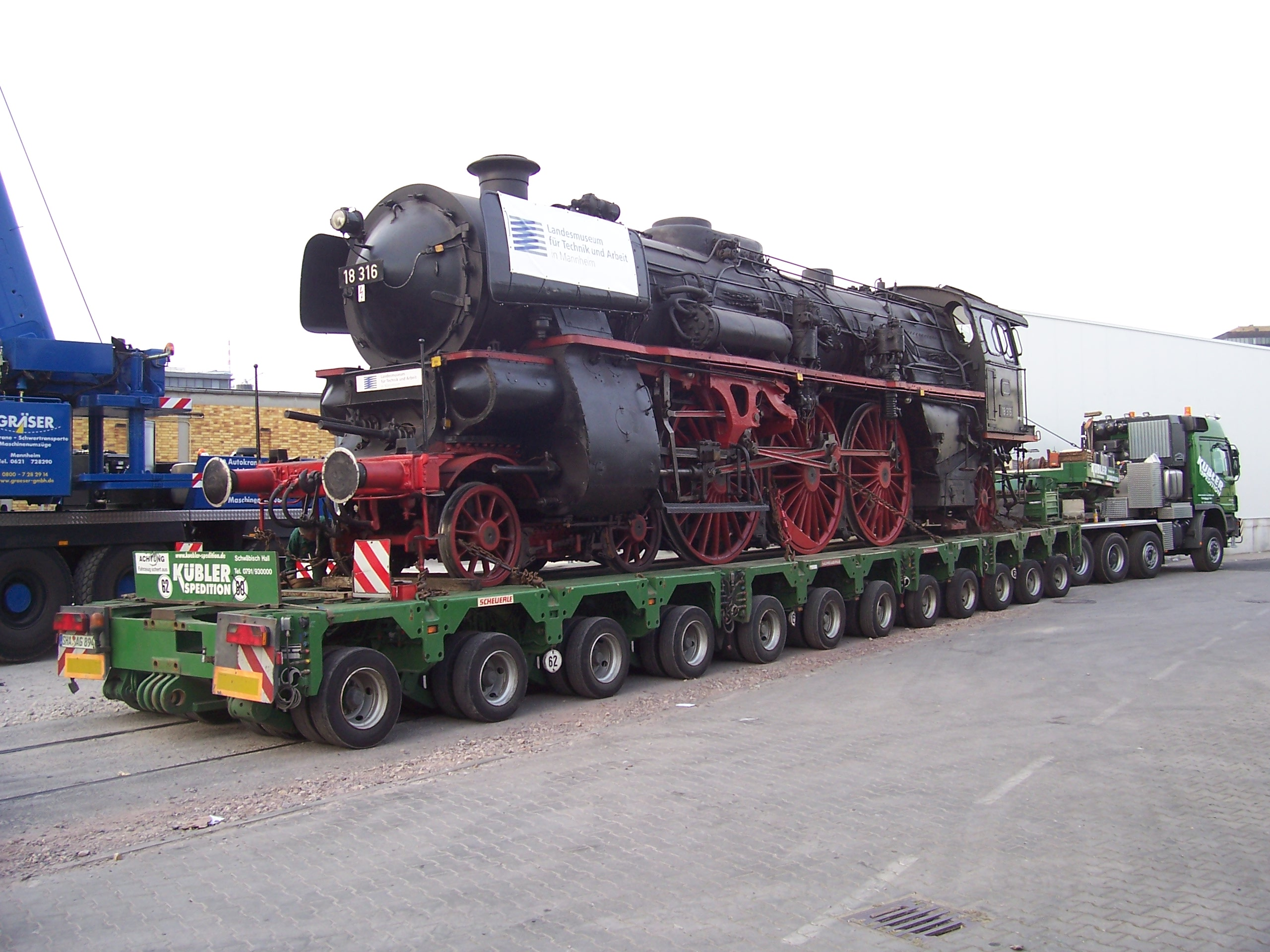 Die Badische IV h Baureihe 18 316 ist zum Transport ins Landesmuseum für Technik und Arbeit in Mannheim am 24. April 2007 bereits auf einen Schwertransporter aufgeladen. Der Tender ist abgekuppelt und auf dem Bild nicht sichtbar auf einem zweiten Transporter verladen.